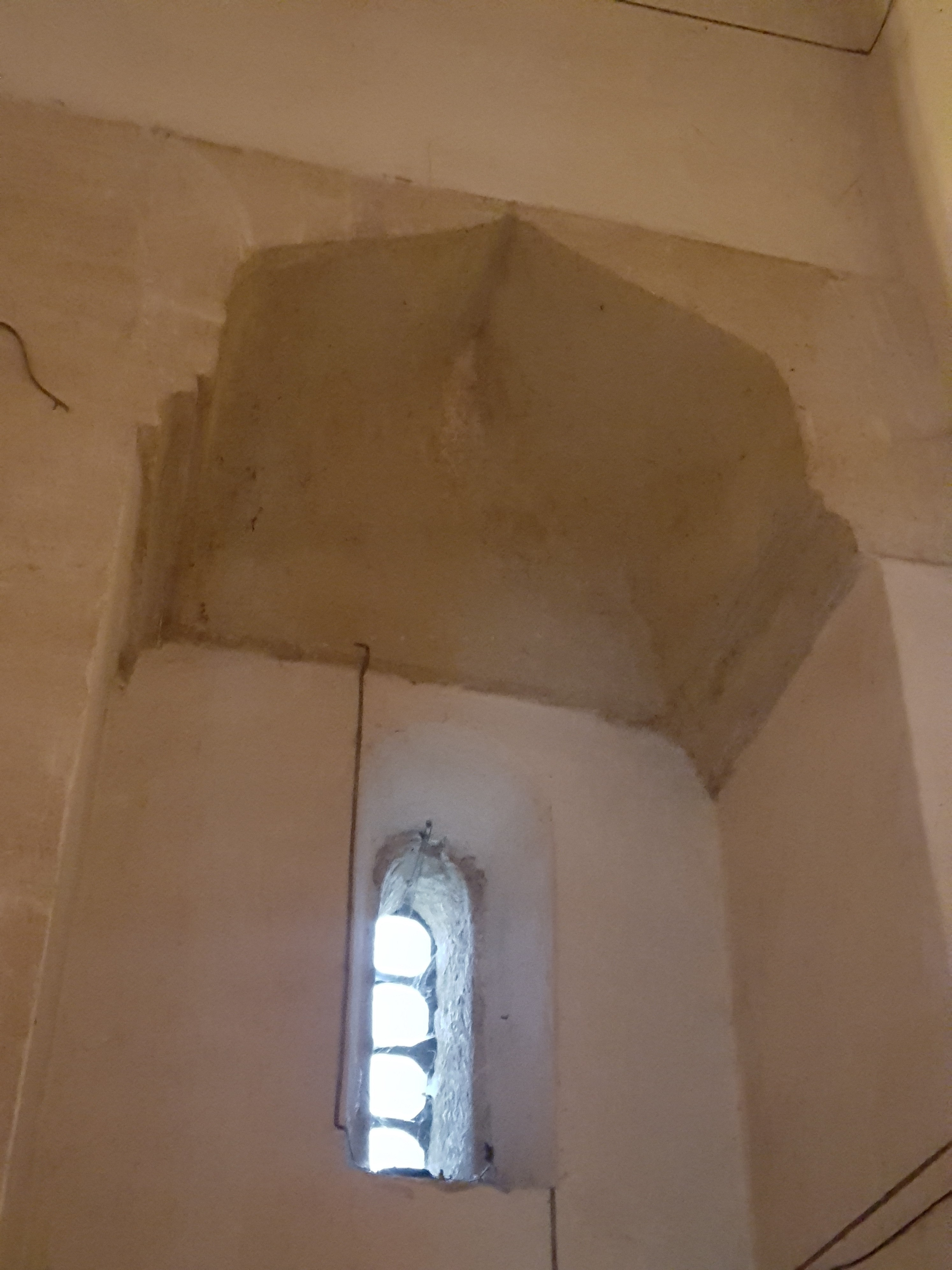 Apsydy boczne w formie wnęk wybranych w ścianie wschodniej nawy oraz łuki w ośli grzbiet wsparte na profilowanych impostach znajdują analogię do arkad prowadzących do wąskich pomieszczeń po bokach absydy środkowej katedry ormiańskiej we Lwowie wzniesionej po 1363 roku.